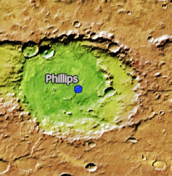 Cráter marciano Phillips. (Imagen IAU/USGS/Goddard/A SU/USGS)